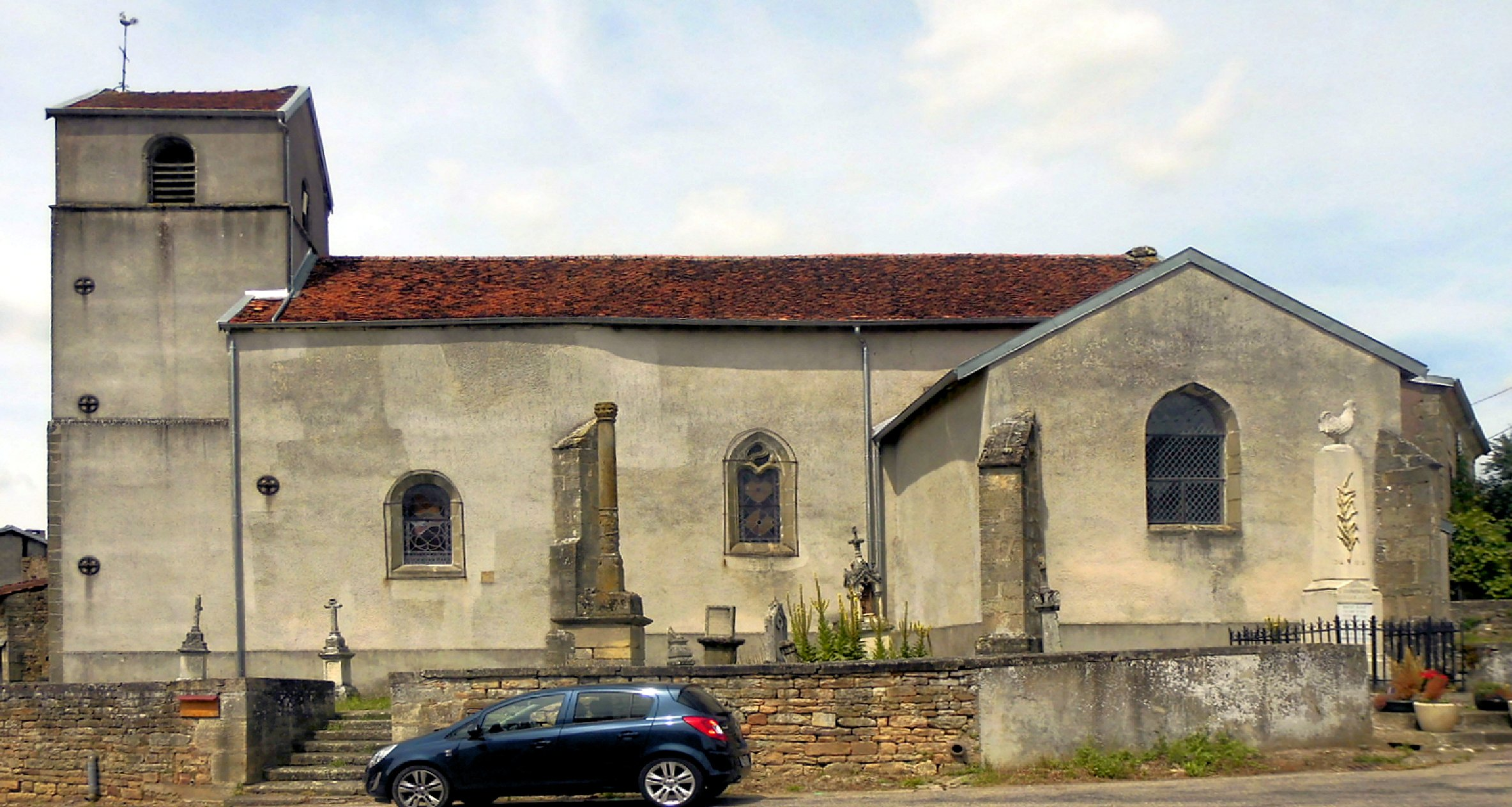 L'église Sainte-Élisabeth à Grignoncourt